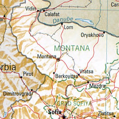 Montana - Lage des Ortes in Bulgarien